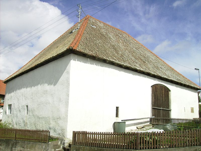 Zehentstadel Heroldingen - Eigentümer Rieser Bauernmuseums- und Mühlenverein e.V. - genutzt als Bauernmuesum